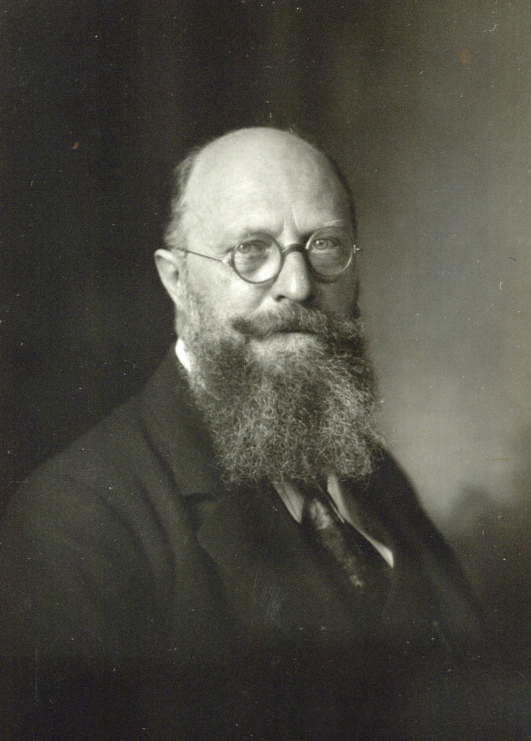 Thorvald August Marinus Stauning (26. oktober 1873 - 3. maj 1942), Søn af Karetmager P.A. Stauning og hustru f. Hansen. Dansk socialdemokratisk politiker. Han blev den første danske, socialdemokratiske statsminister.